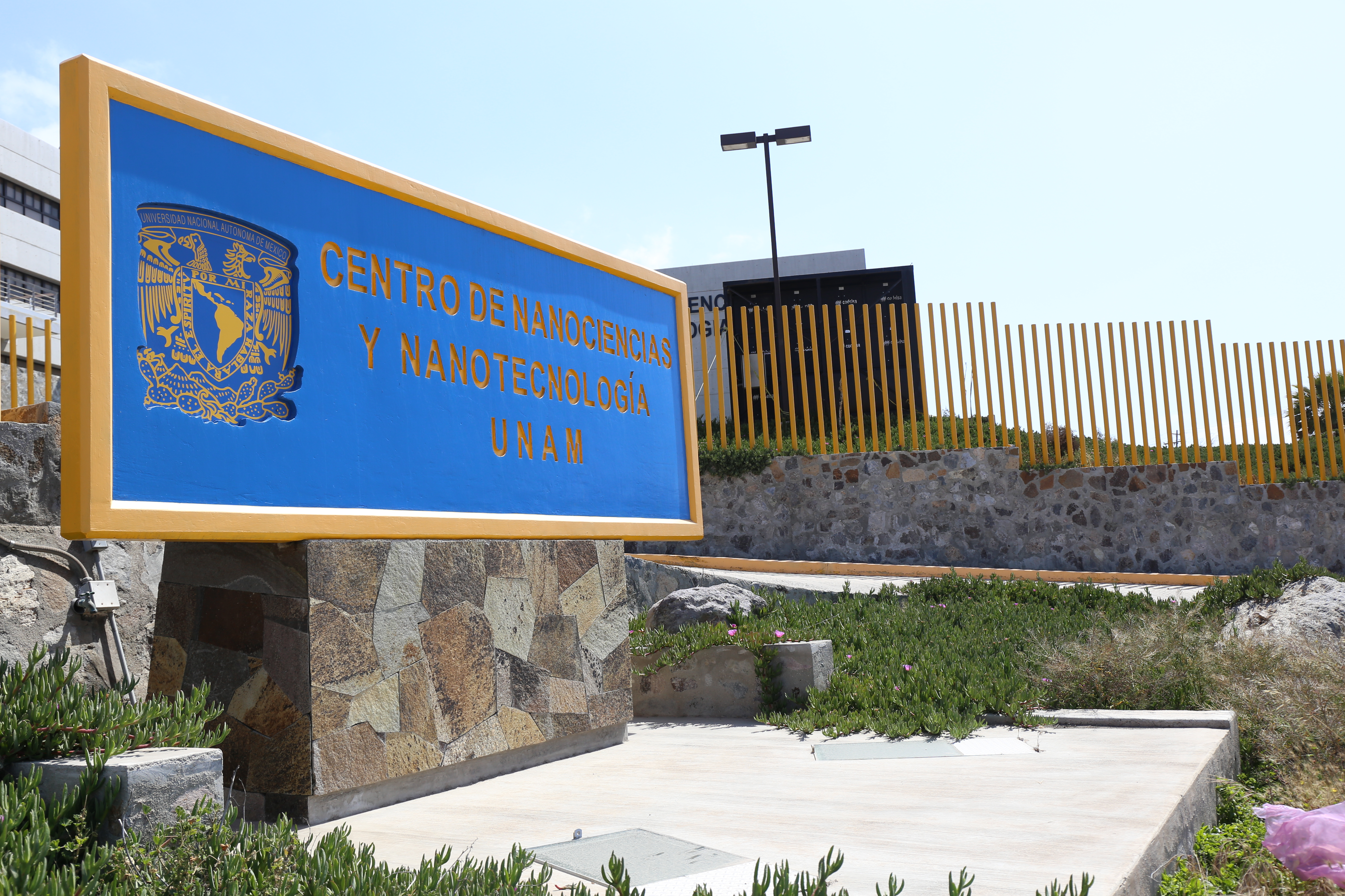 CNyN Fachada en el Campus Ensenada, B.C.